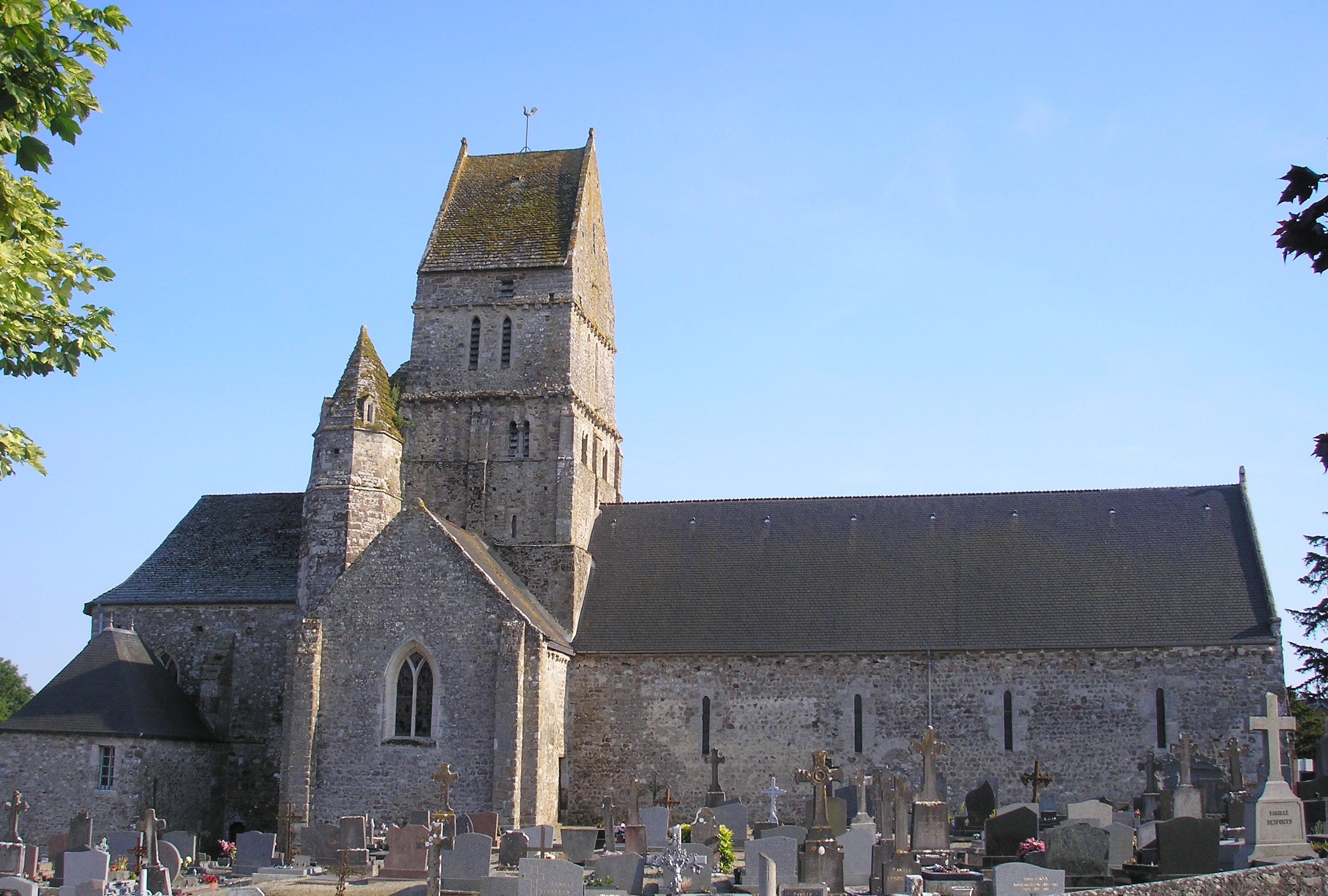 Orval (Normandie, France). L'église Sainte-Hélène.